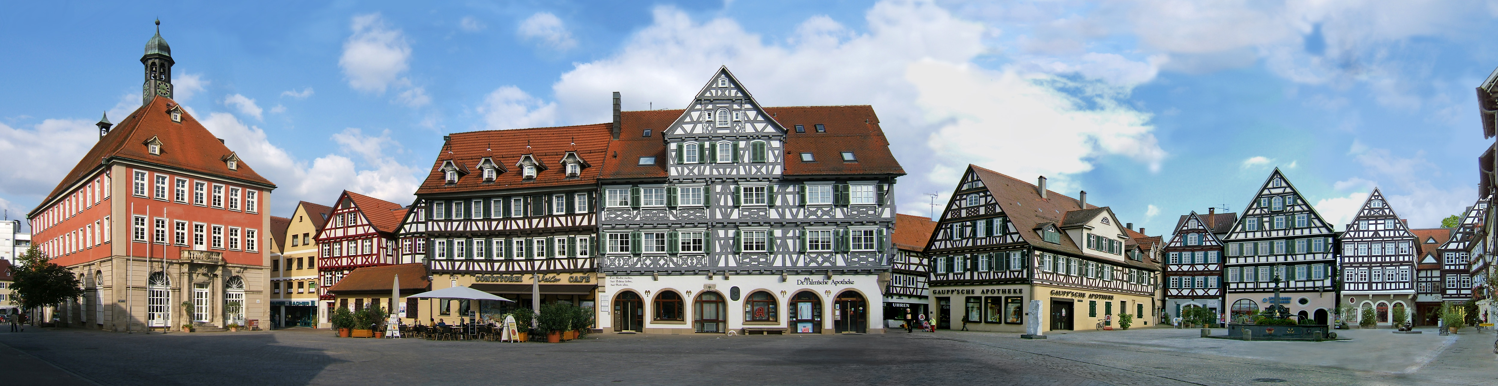 Marktplatz in Schorndorf, Deutschland, mit dem Rathaus (links) und diversen Fachwerkhäusern, darunter Künkelinhaus, Palm'sche Apotheke, Gaupp'sche Apotheke und anderen, sowie dem Marktbrunnen und den Skulpturen "Fortschnittschritt" von Hüseyin Altin (links des Brunnens) und "Das Gespräch" von Max Seiz (rechts des Brunnens.